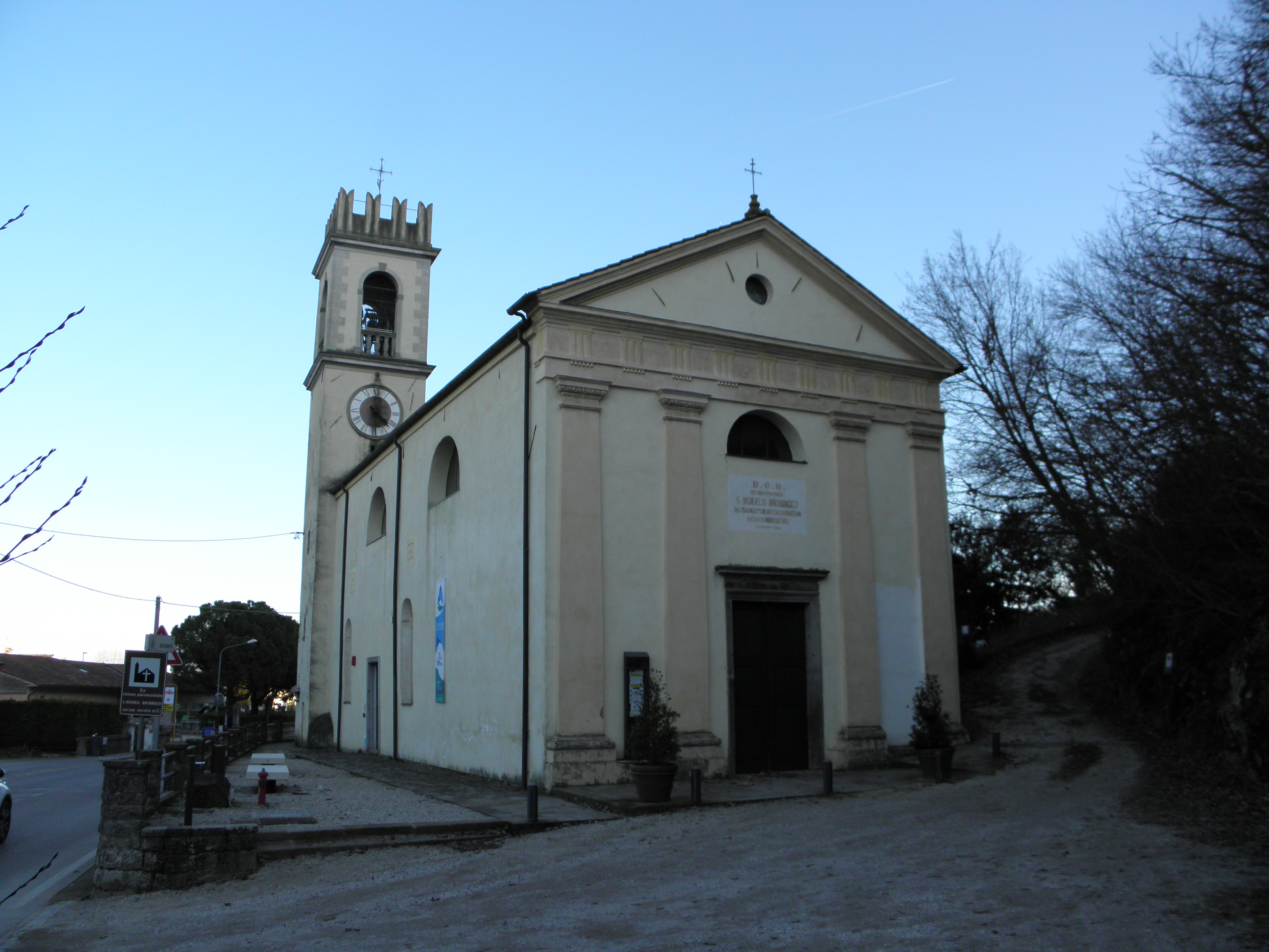 Montemerlo, frazione di Cervarese Santa Croce: la ex chiesa parrocchiale di San Michele Arcangelo, sede della biblioteca comunale.